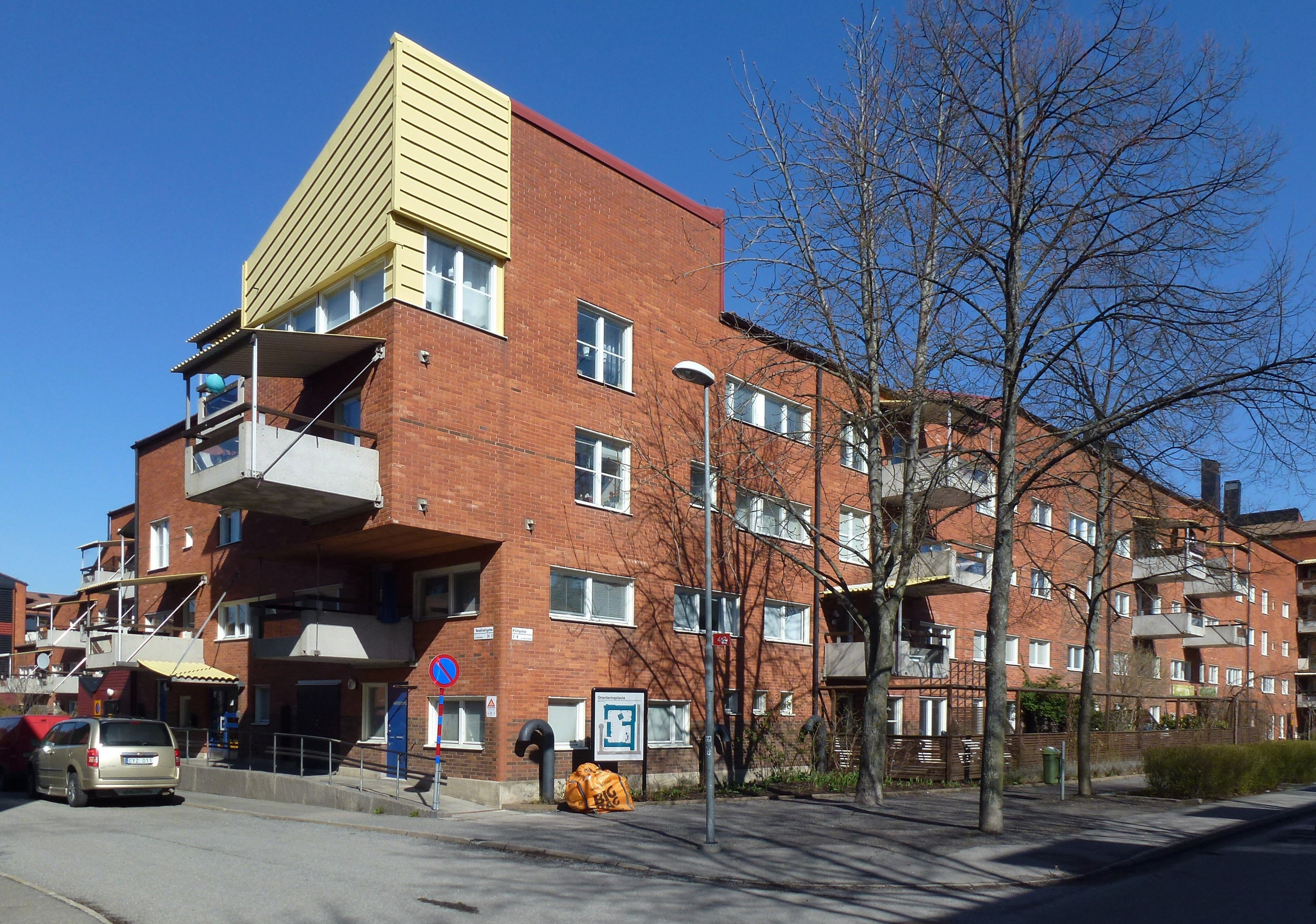 Kvarteret Varmfronten, Skarpnäck, arkitekt Arken arkitekter